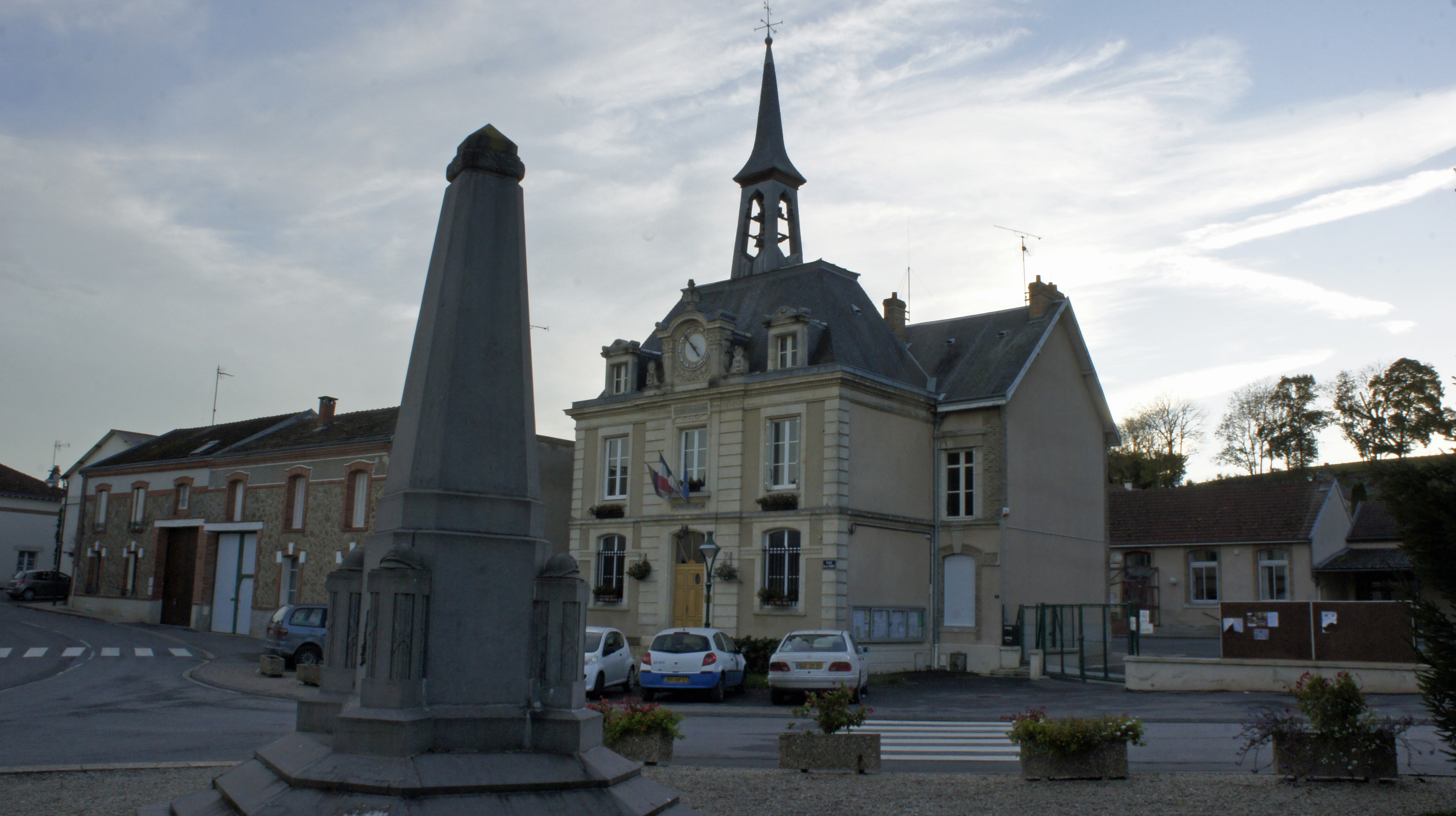 La mairie et le monument aux morts au village de Nogent-l'Abesse.